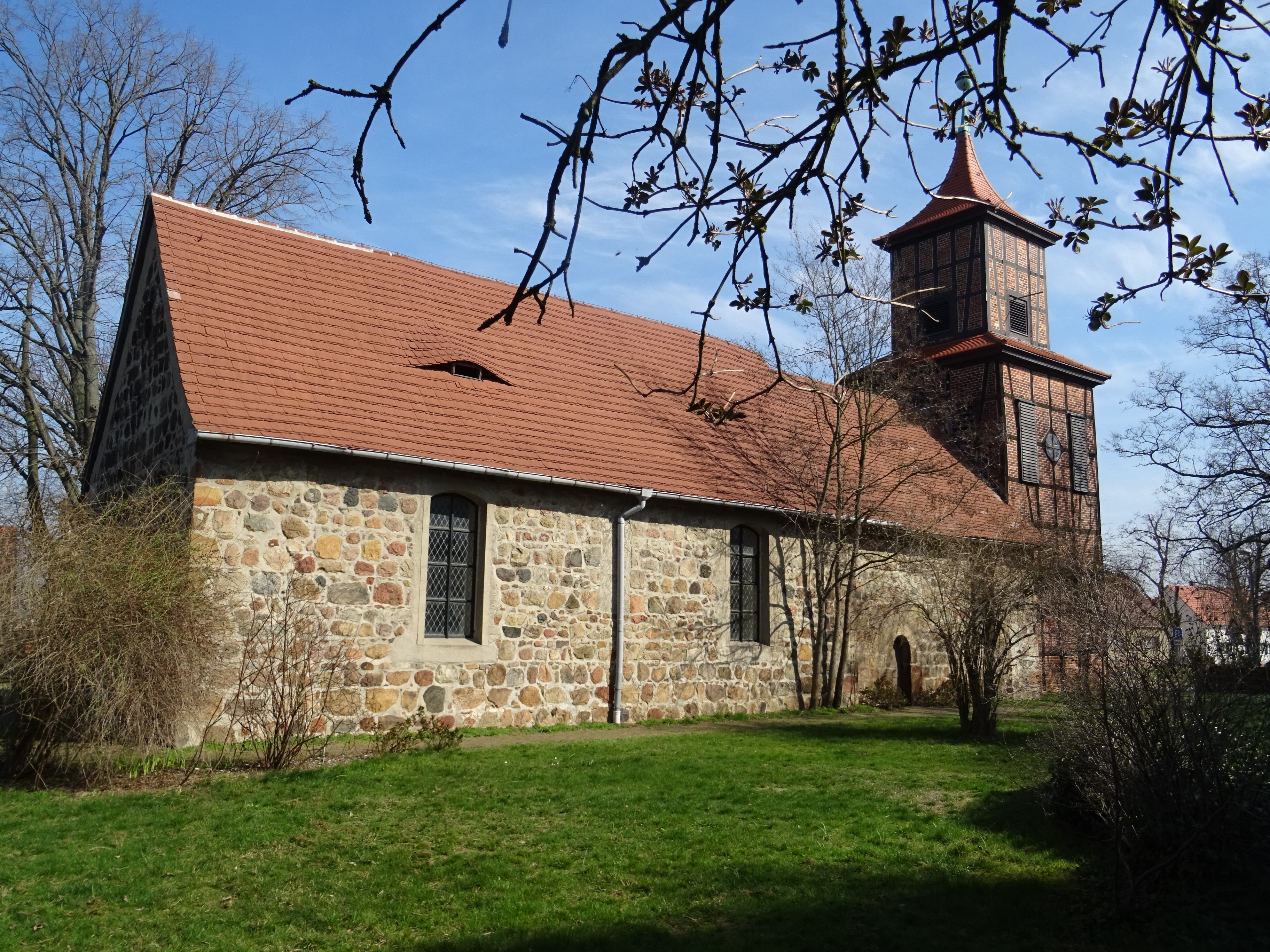 Bergwitz, Dorfkirche, Blick von Südwesten